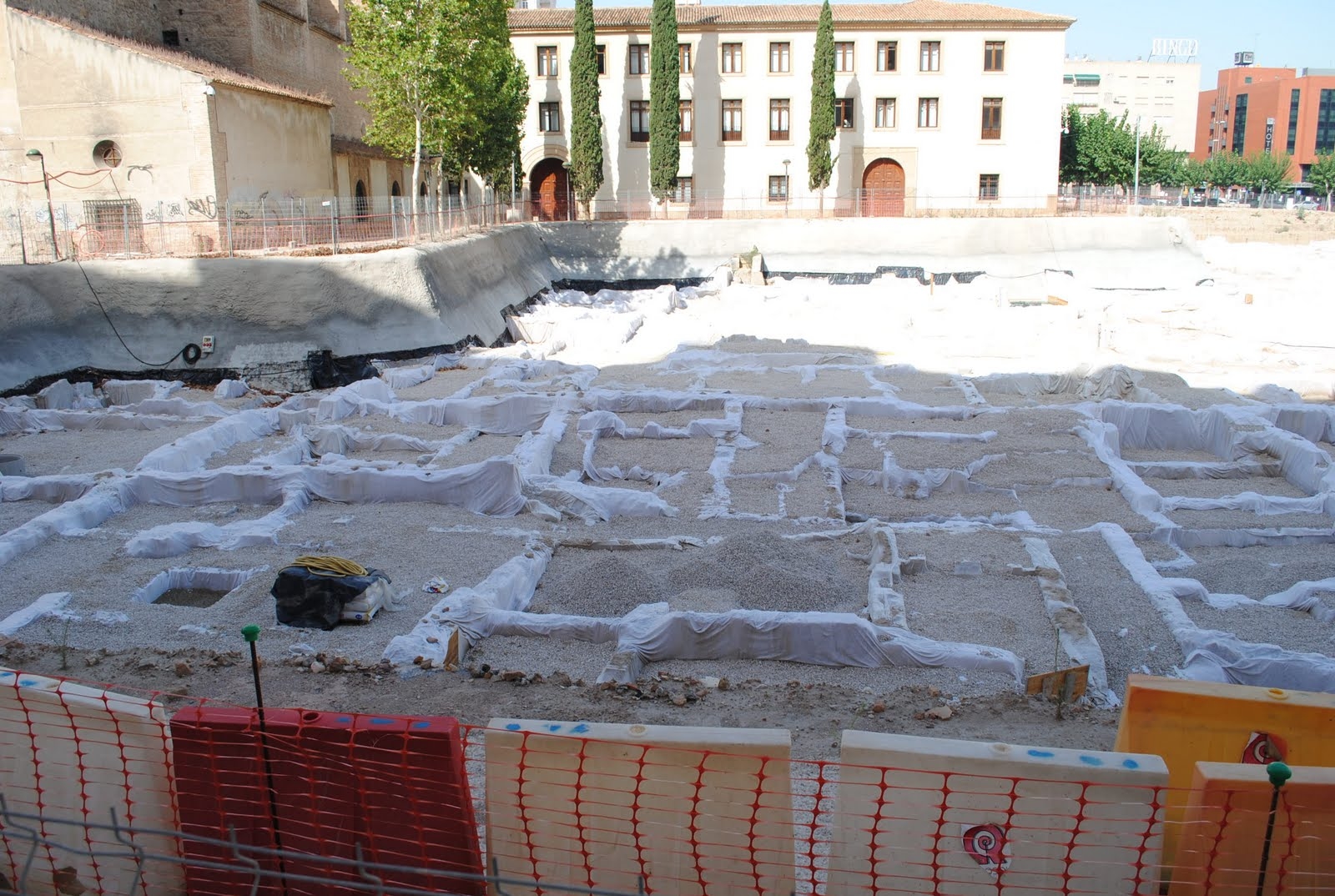 Yacimiento San Esteban